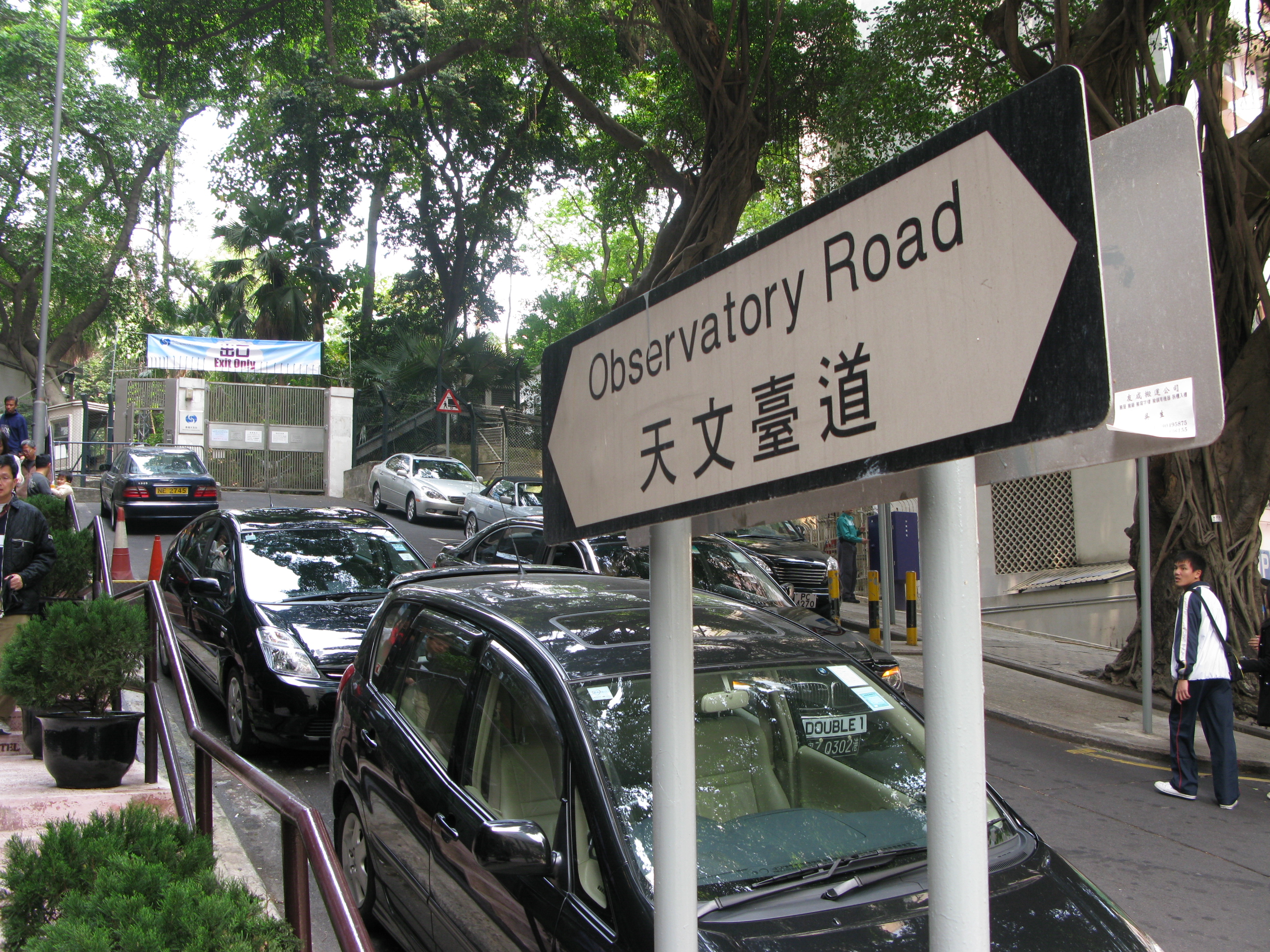 中文（香港）: 香港尖沙咀天文臺道